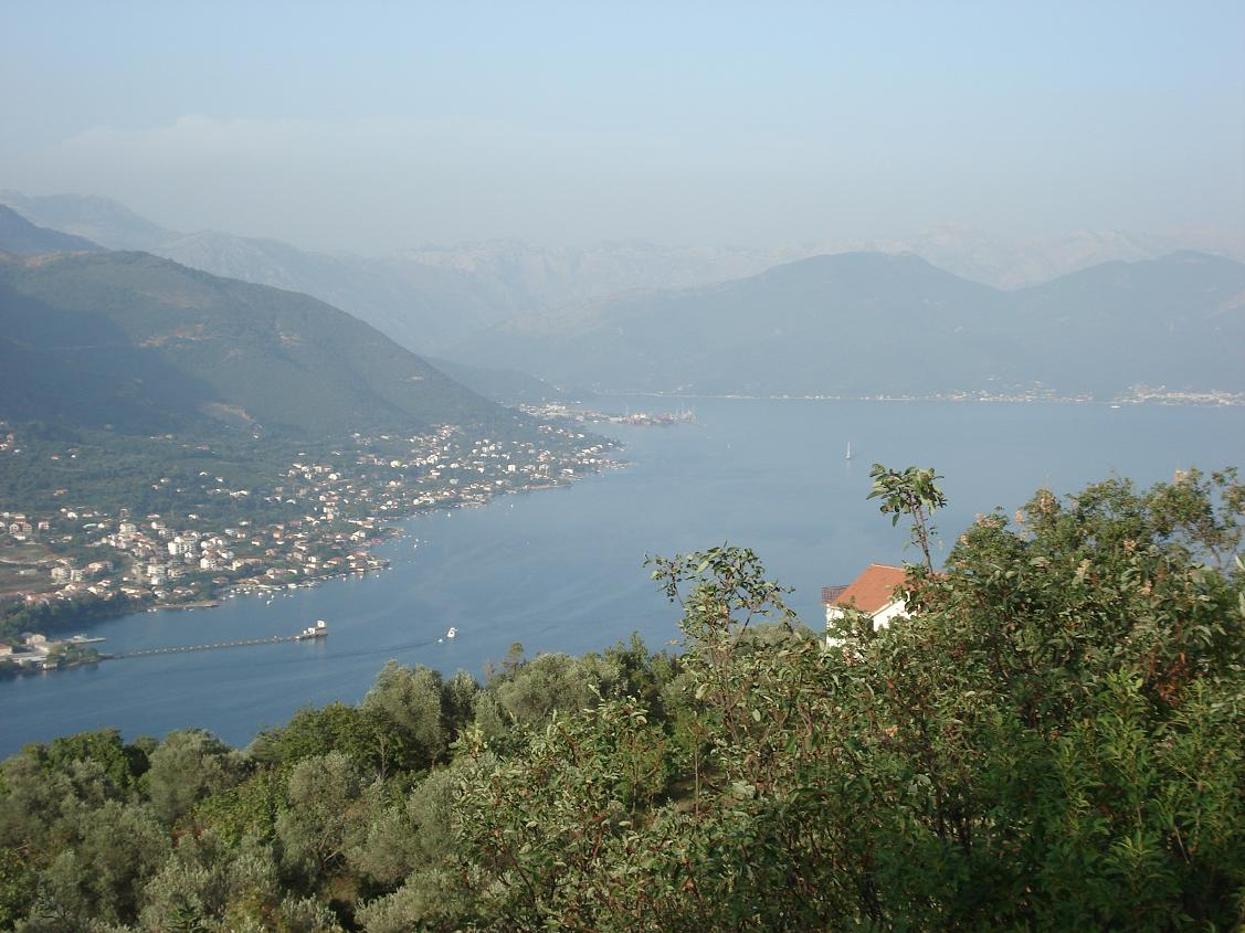 Blick auf die Boka Kotorska